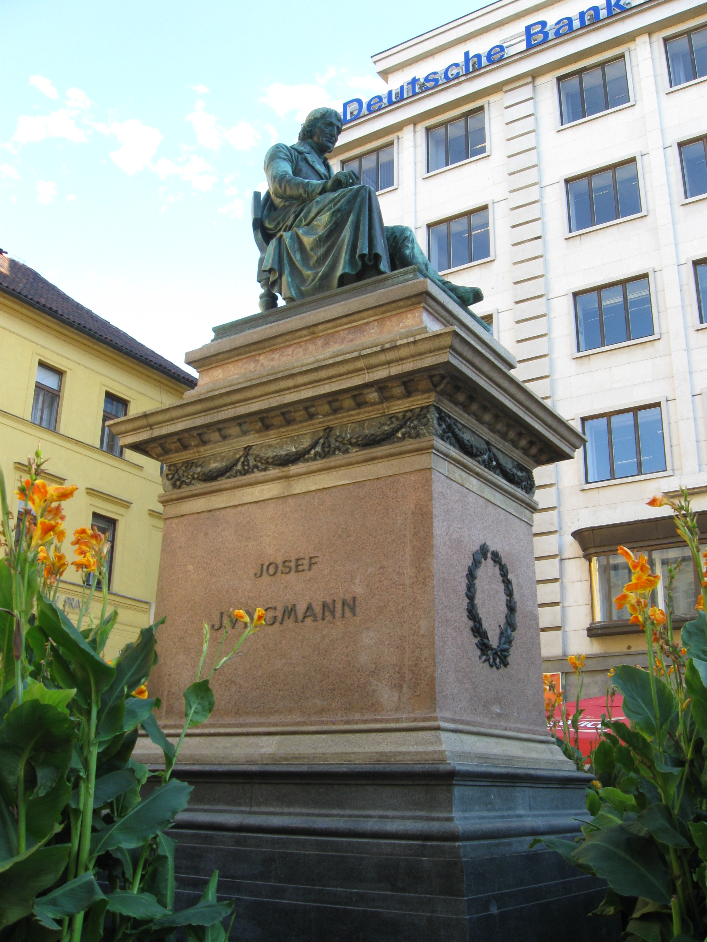 Pomník J. Jungmanna (Nové Město), Praha 1, Jungmannovo nám., Nové Město